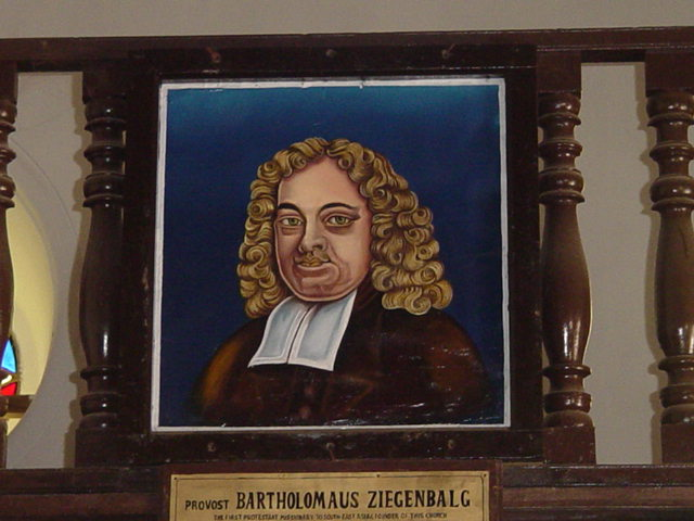 சீகன் பால்குவின் ஓவியம்